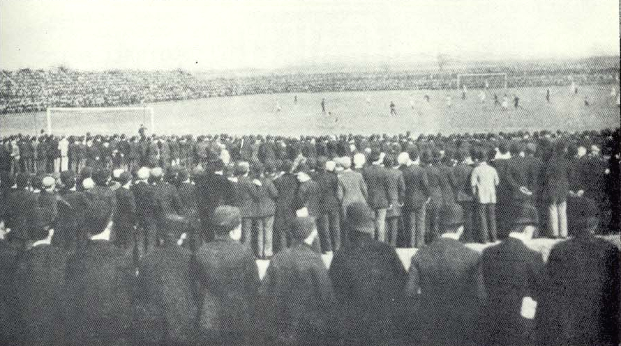 F. A.-Cup-Finale 1893: Wolverhampton Wanderers - FC Everton 1:0 vor 45.067 Zuschauern; Fallowfield, Manchester